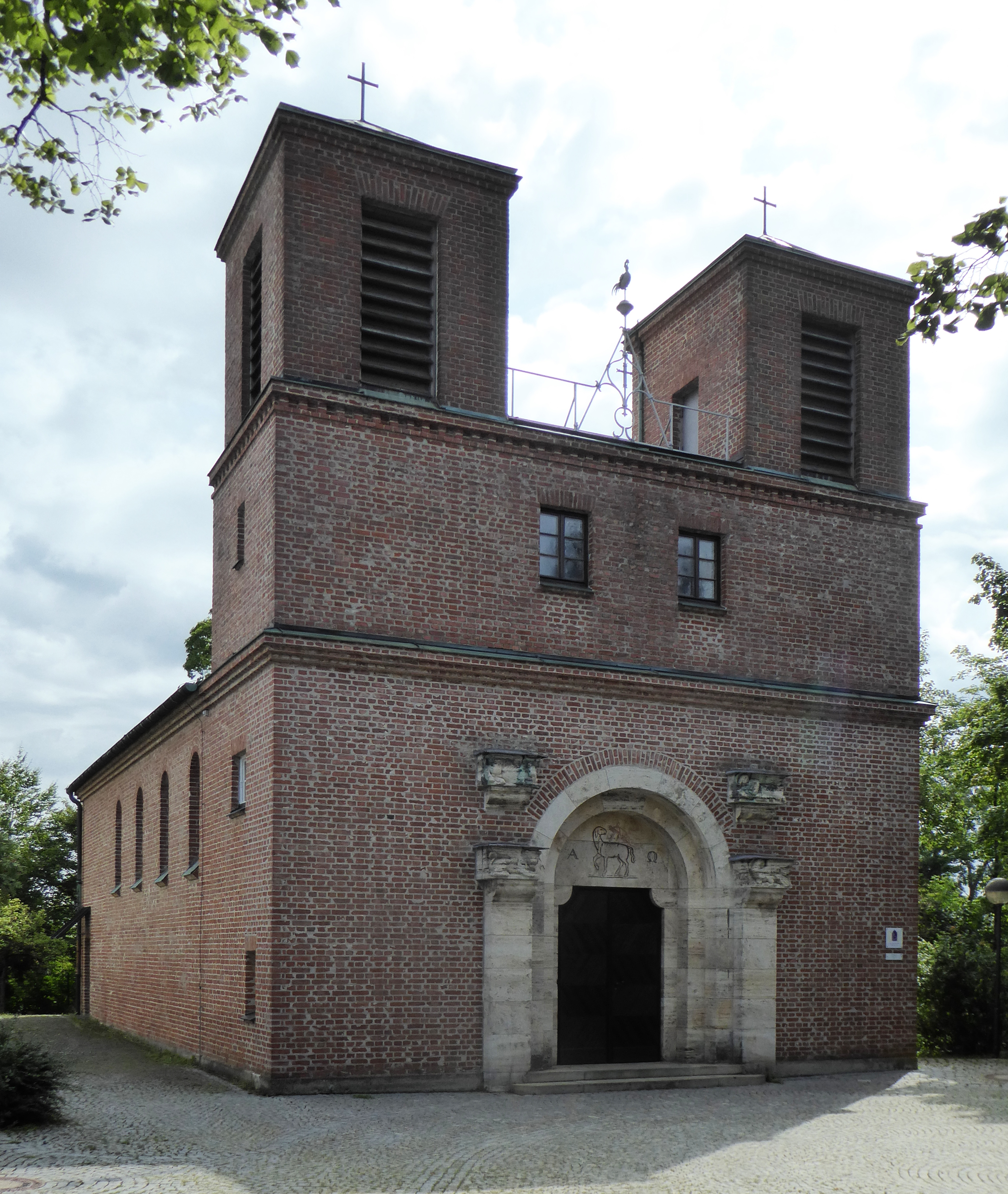 Gauting, Christuskirche von Westen gesehen.